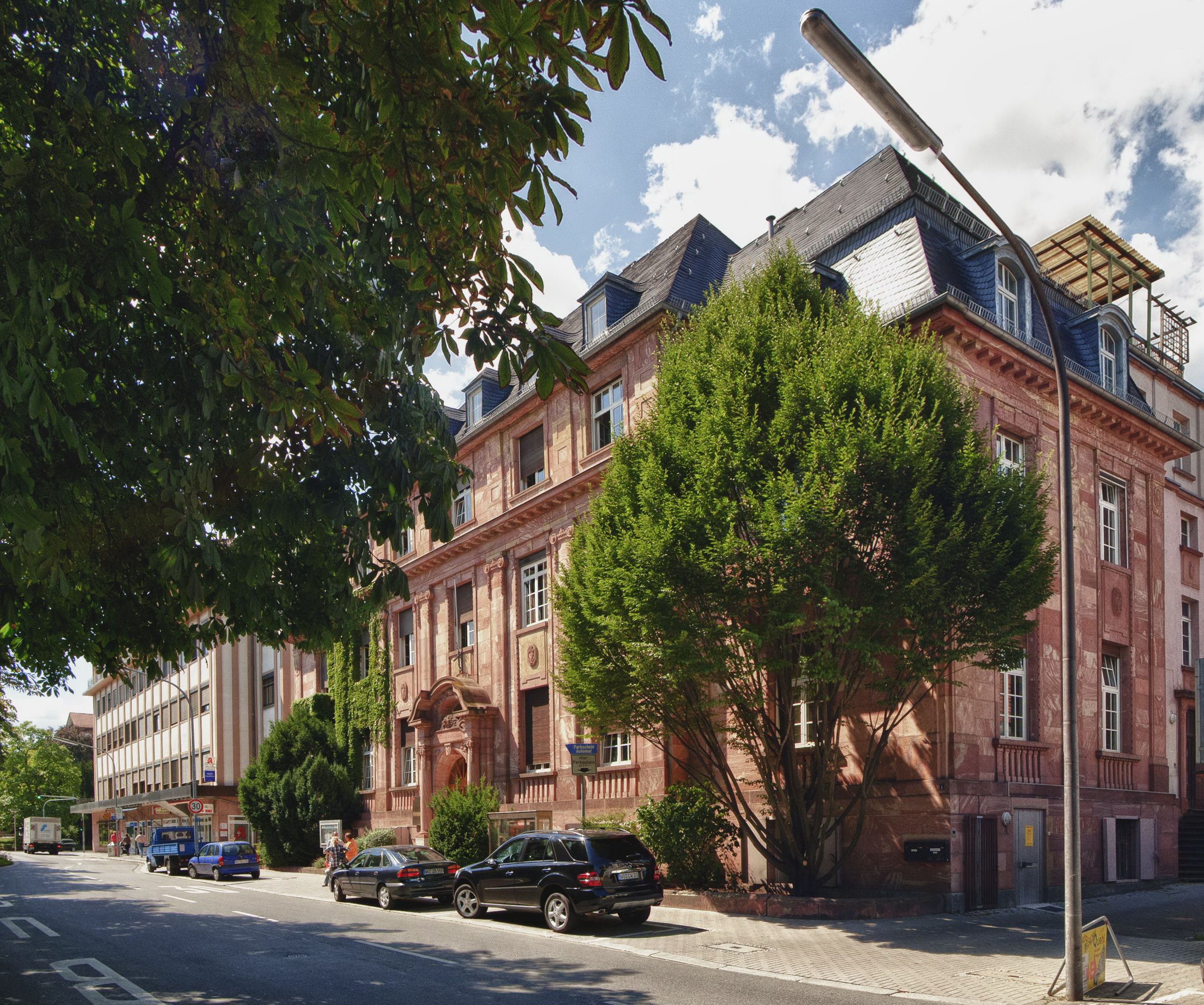 Worms, Verwaltungsgebäude, ehemalige Sparkasse; neubarocker Sandsteinquaderbau, Jugendstil-Motive, Mansardwalmdach mit Zwerchhauszeile, 1912, Architekt Georg Metzler, Worms